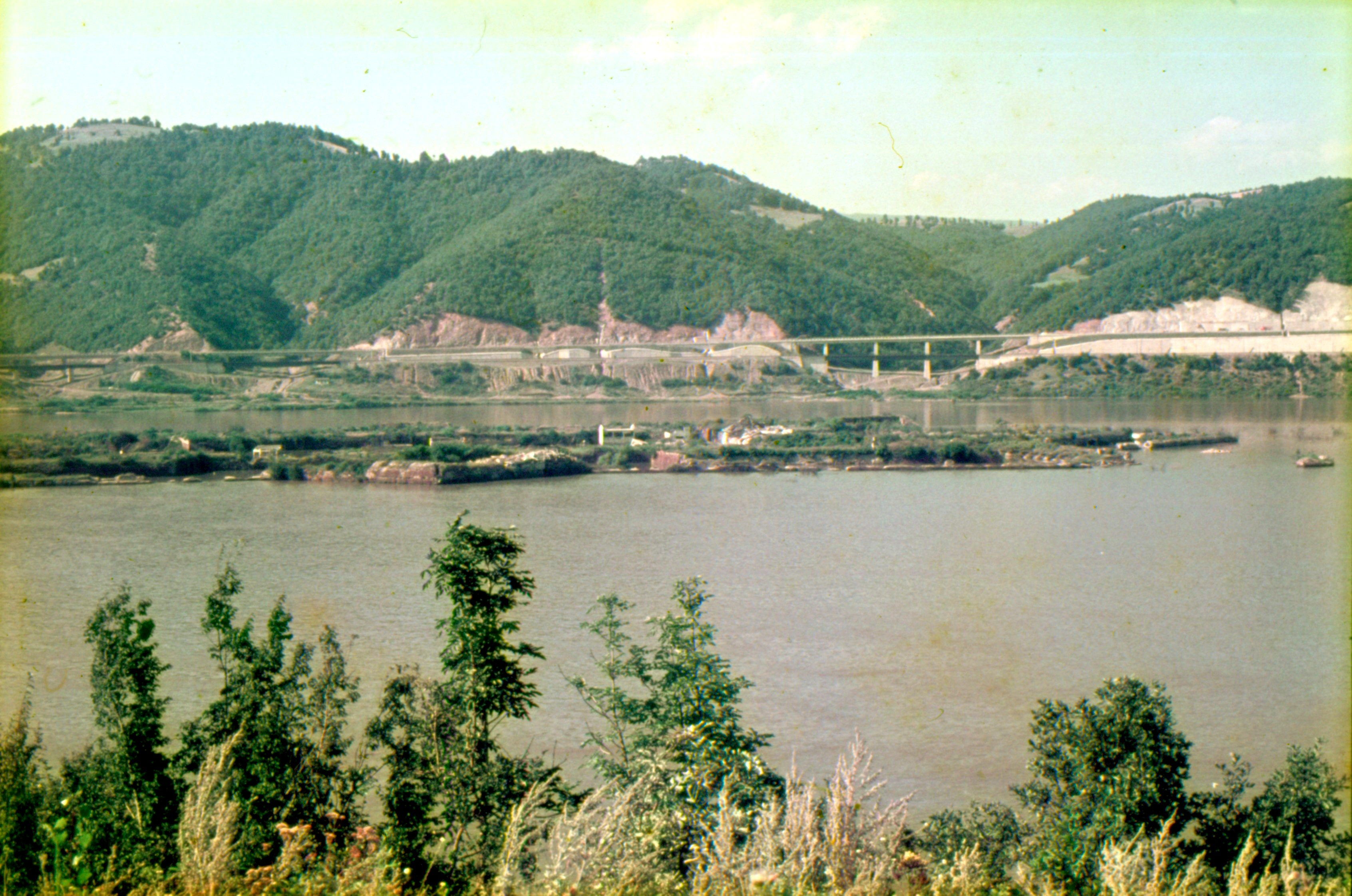 Reste der Ada Kaleh (wohl der Festung) im Jahre 1970. Aufgenommen am 20.8.1970 aus der Nähe des serbischen Ortes Tekija.